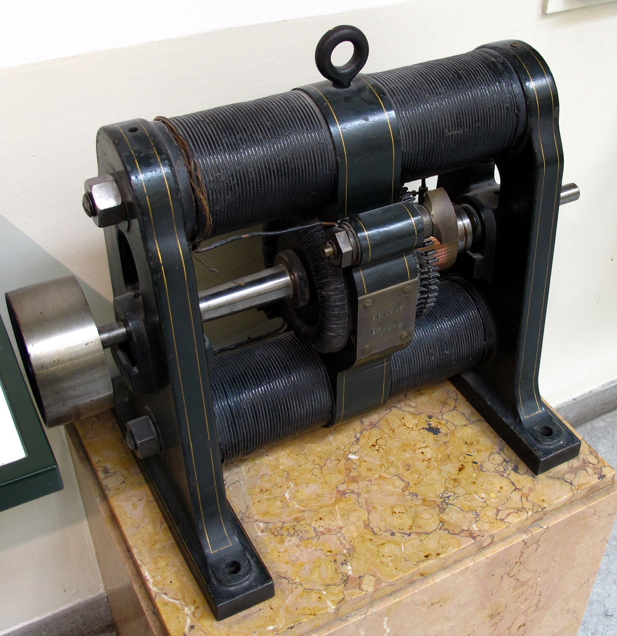 Gleichstromgenerator welcher als Ringankermaschine nach dem System Gramme aufgebaut ist. Sie diente zur Speisung von ersten elektrischen Beleuchtungsanlagen. Hersteller: Gramme, 1880